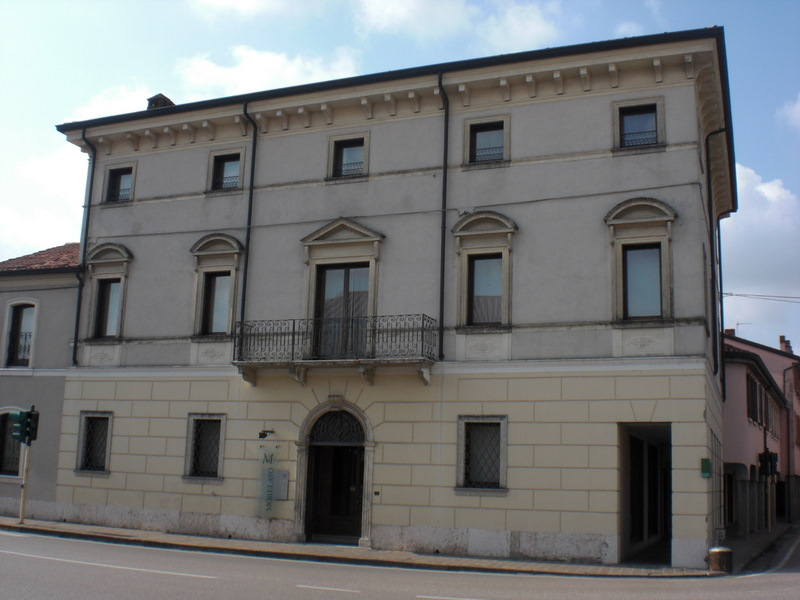 Palazzo Taidelli di Sanguinetto (VR) - XVIII secolo